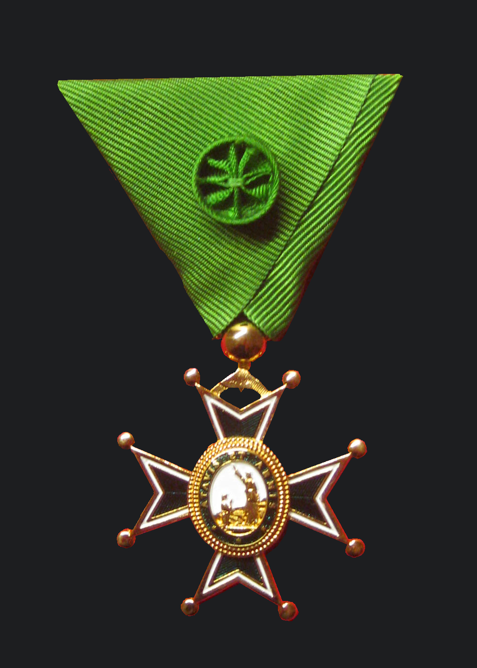 Offizier des Lazarus-Ordens